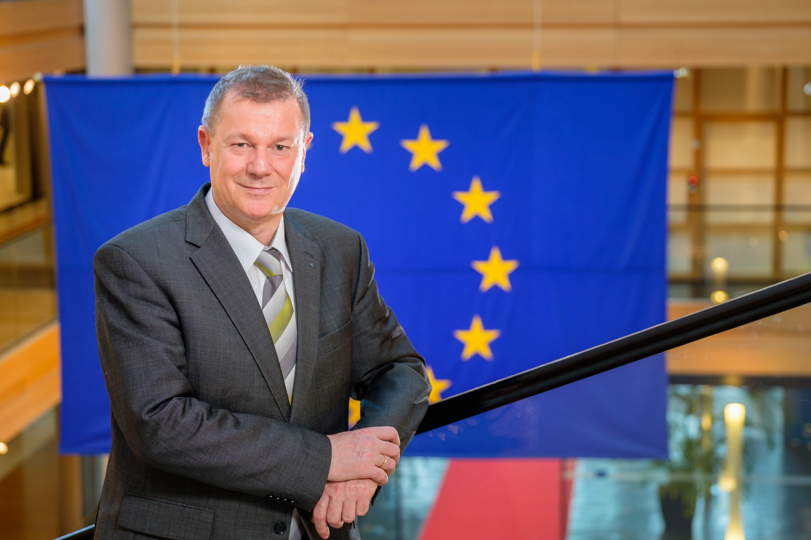 Dr. Markus Pieper MdEP